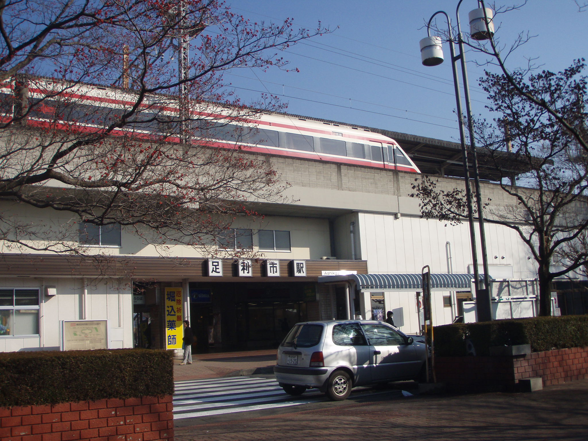 Ashikagashi-station